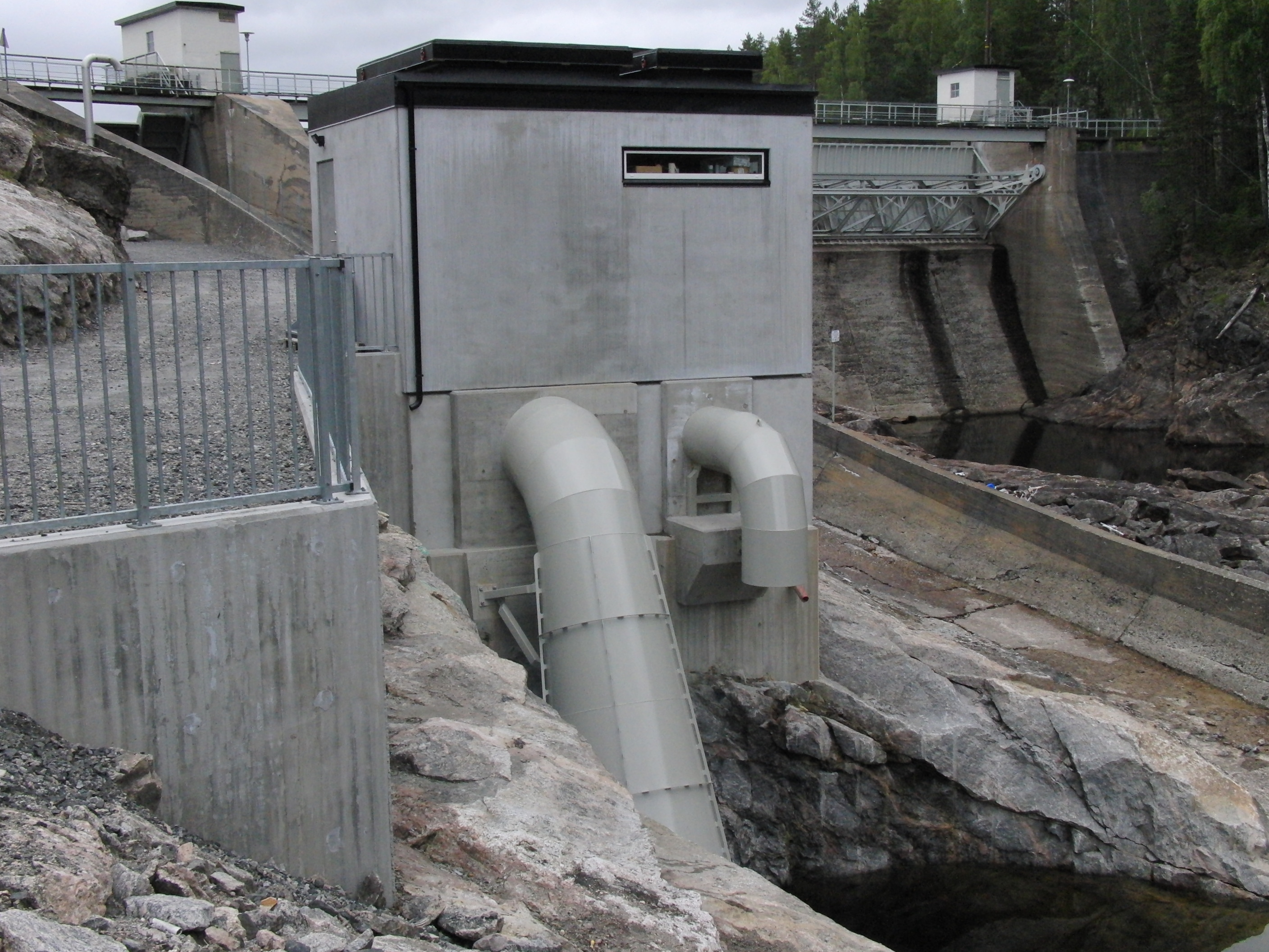 Gåseflå kraftverk